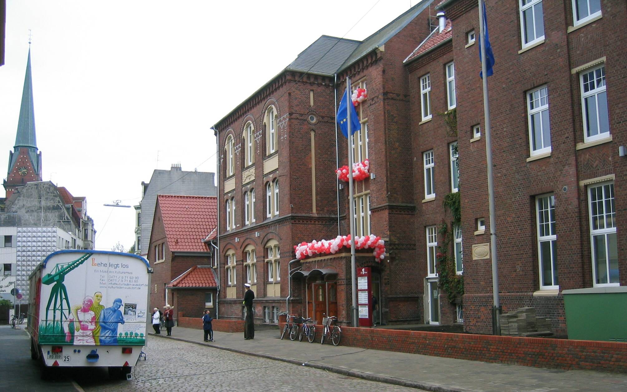 Lehe: ehemalige Theodor-Storm-Schule am Tag der offenen Tür nach dem Umbau Das abgebildete Objekt ist ein geschütztes Kulturdenkmal in der Freien Hansestadt Bremen, mit der Nr. 3138 beim Landesamt für Denkmalpflege registriert.